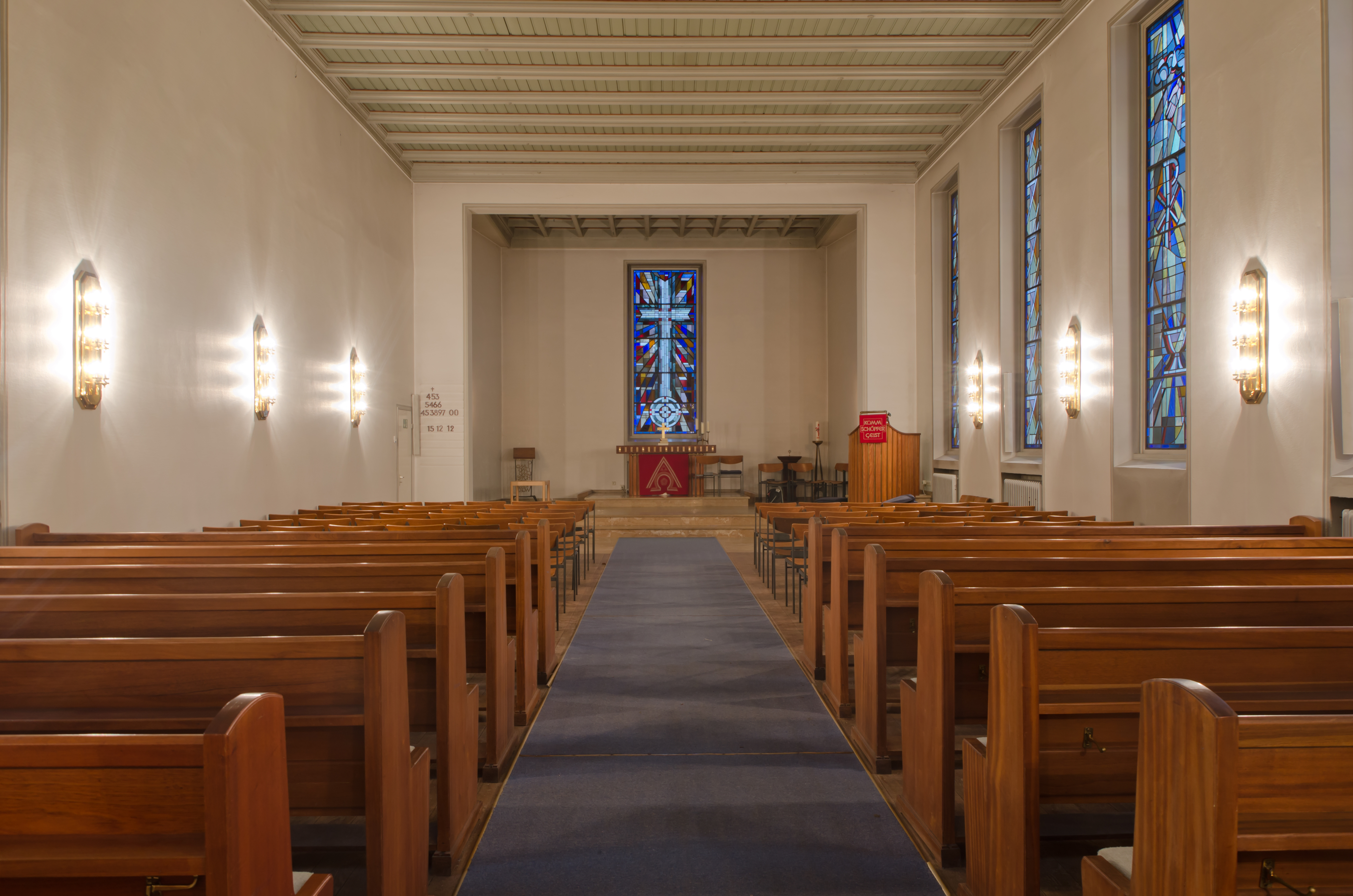 Thomaskirche HH-Rahlstedt Blick nach Nordwesten